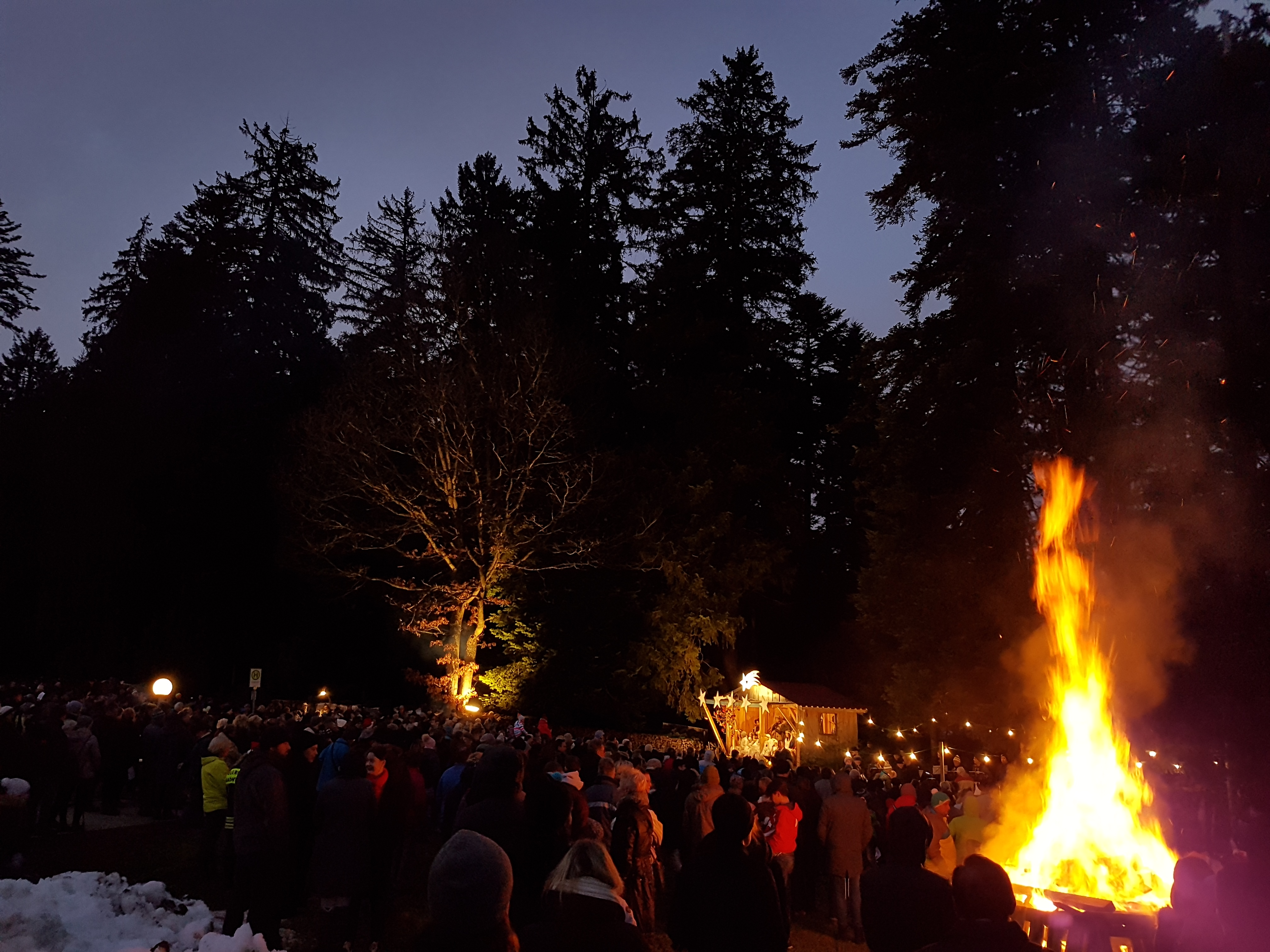 Jährlich findet in Bad Wildbad - Aichelberg die Waldweihnacht mit lebender Krippe statt. Eine besinnliche Einstimmung auf Heiligabend.